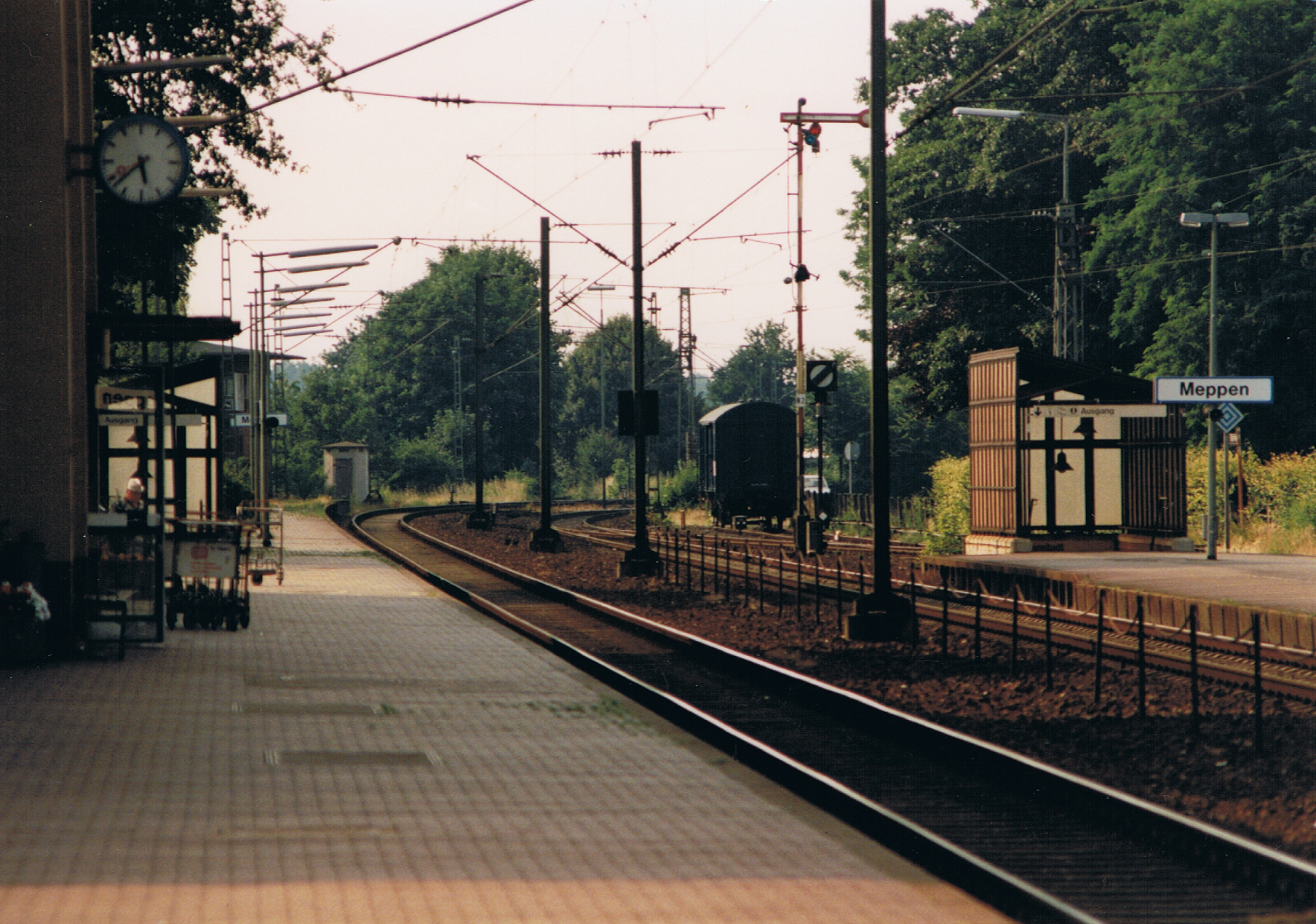 1994 in Meppen an Gleis 1 am Bahnhof